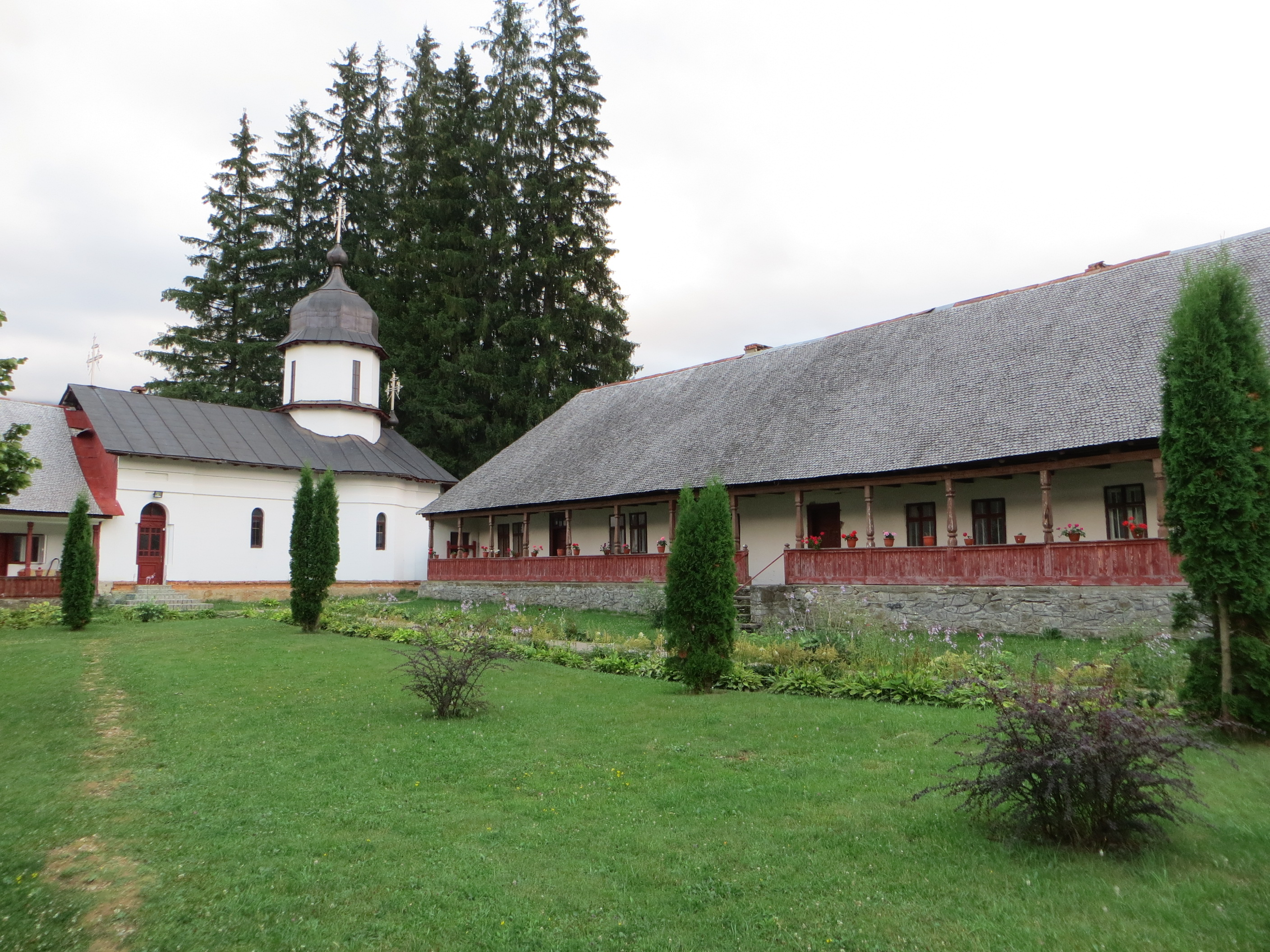 Paraclisul „Adormirea Maicii Domnului” din Mănăstirea Cheia (în stânga) 02